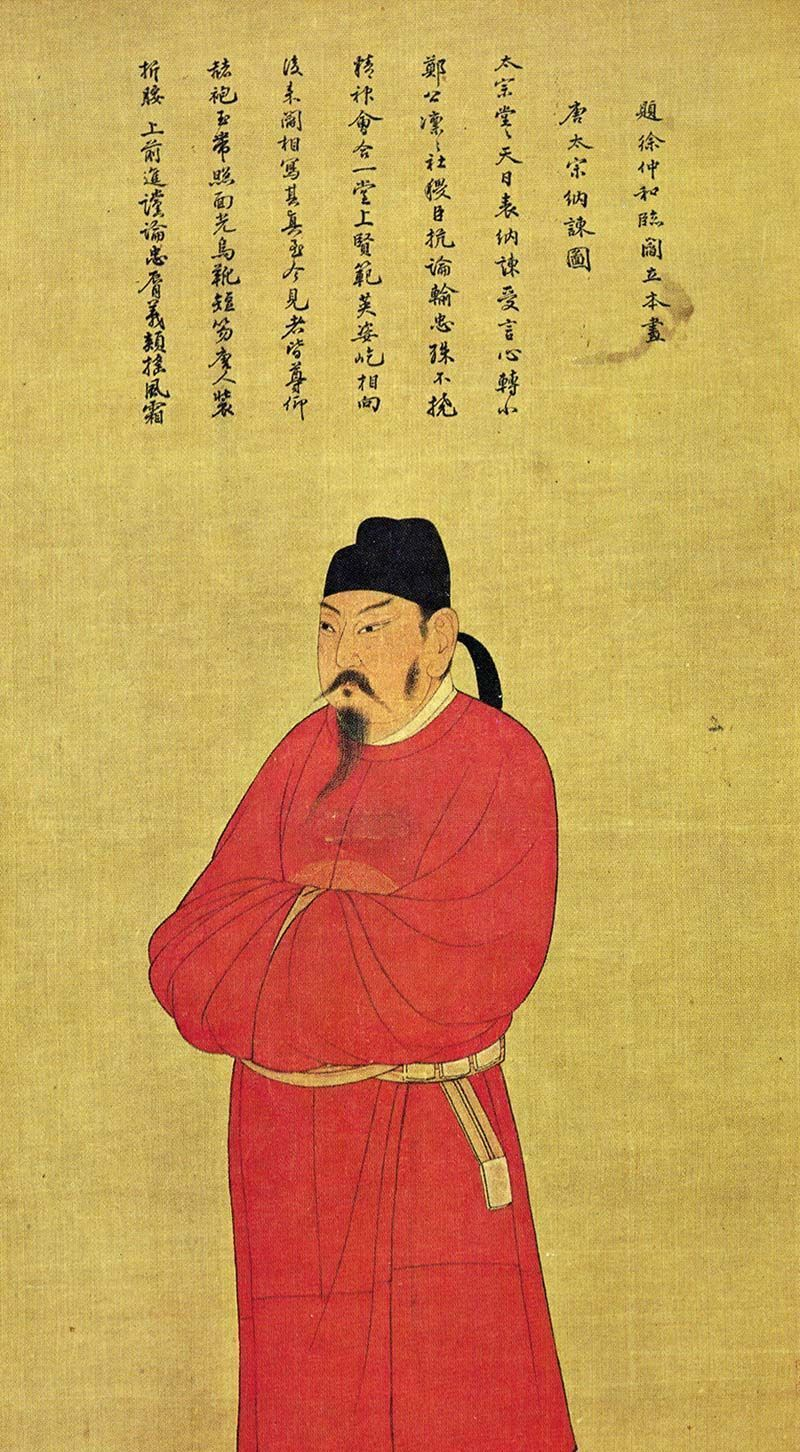 明徐仲和《臨閻立本畫唐太宗納諫圖》，北京故宮南薰殿舊藏，現藏台北故宮博物院（公有領域）。